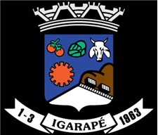 Brasão Oficial da Cidade Igarapé, Minas Gerais.